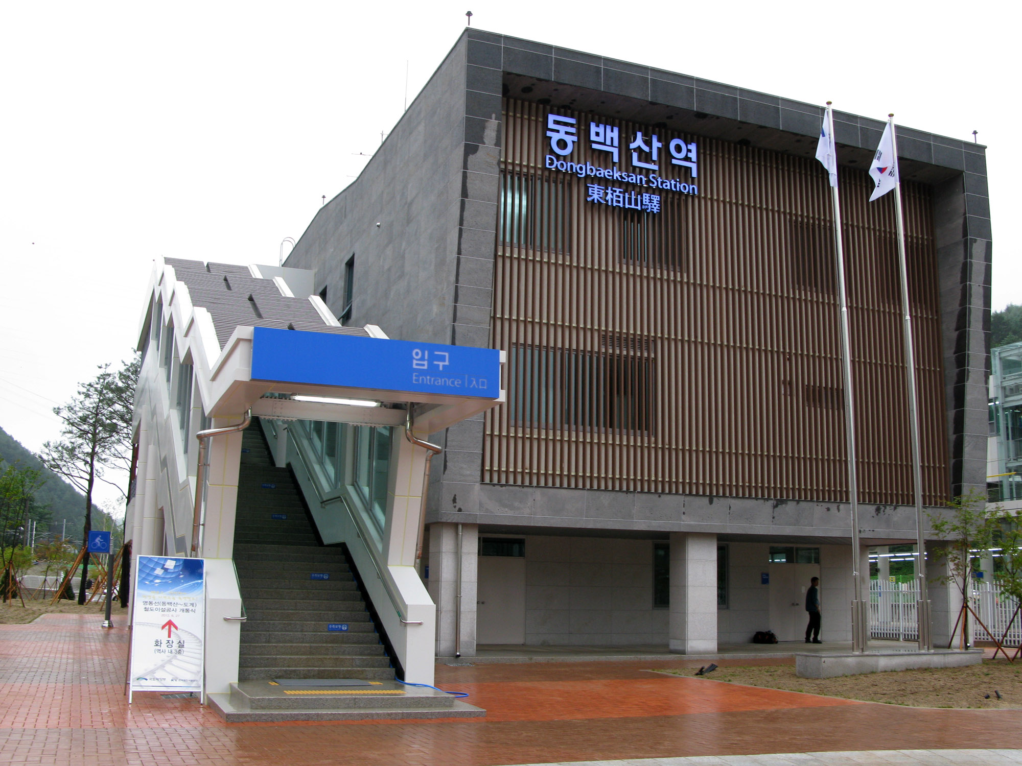 영동선, 태백선 동백산역